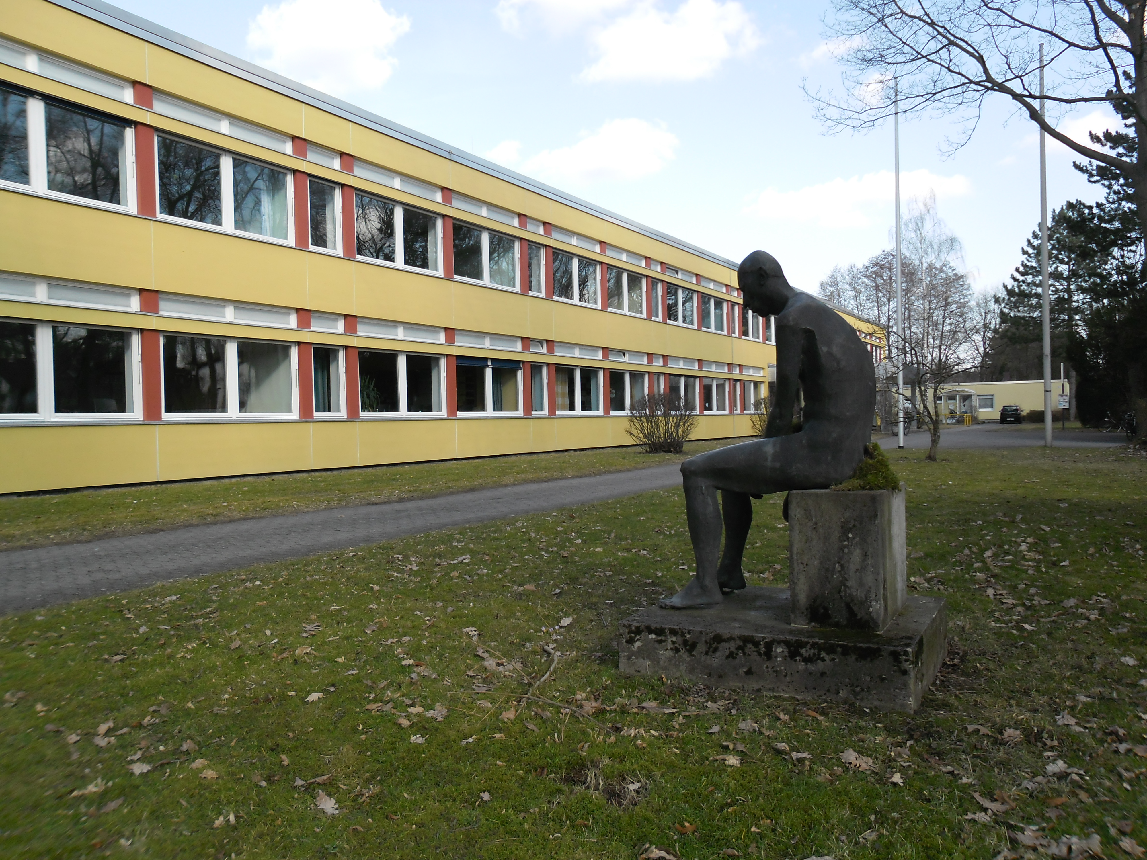 Das Gymnasium Fridericianum liegt nördlich der Sebaldussiedlung, westlich des Buckenhofer Forstes und nordwestlich des Universitätsgeländes an der Erwin-Rommel-Straße in der Sebaldusstraße 39 im Südosten von Erlangen.